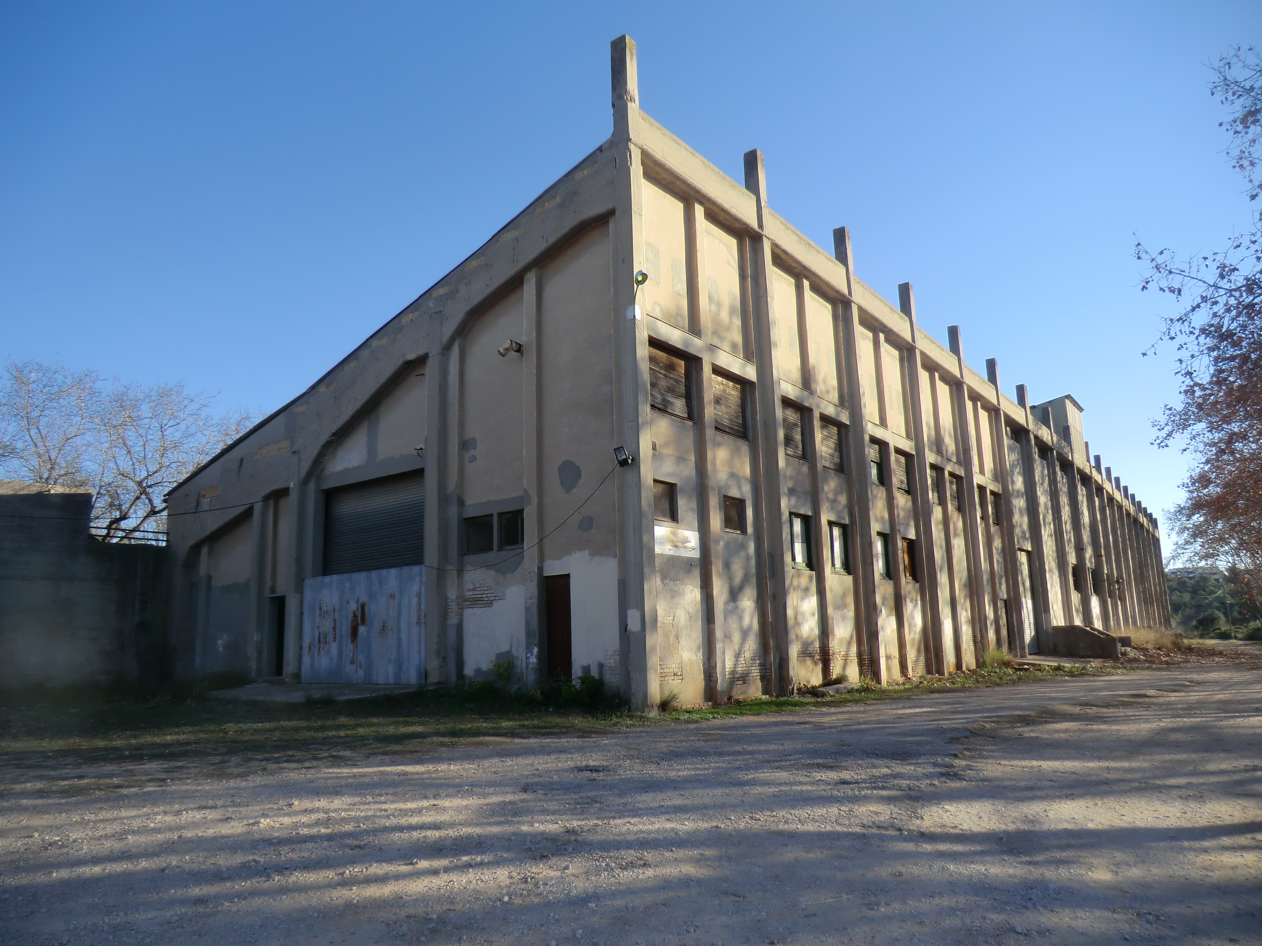 Edifici de tribunes de l'autòdrom de Terramar (Sant Pere de Ribes)